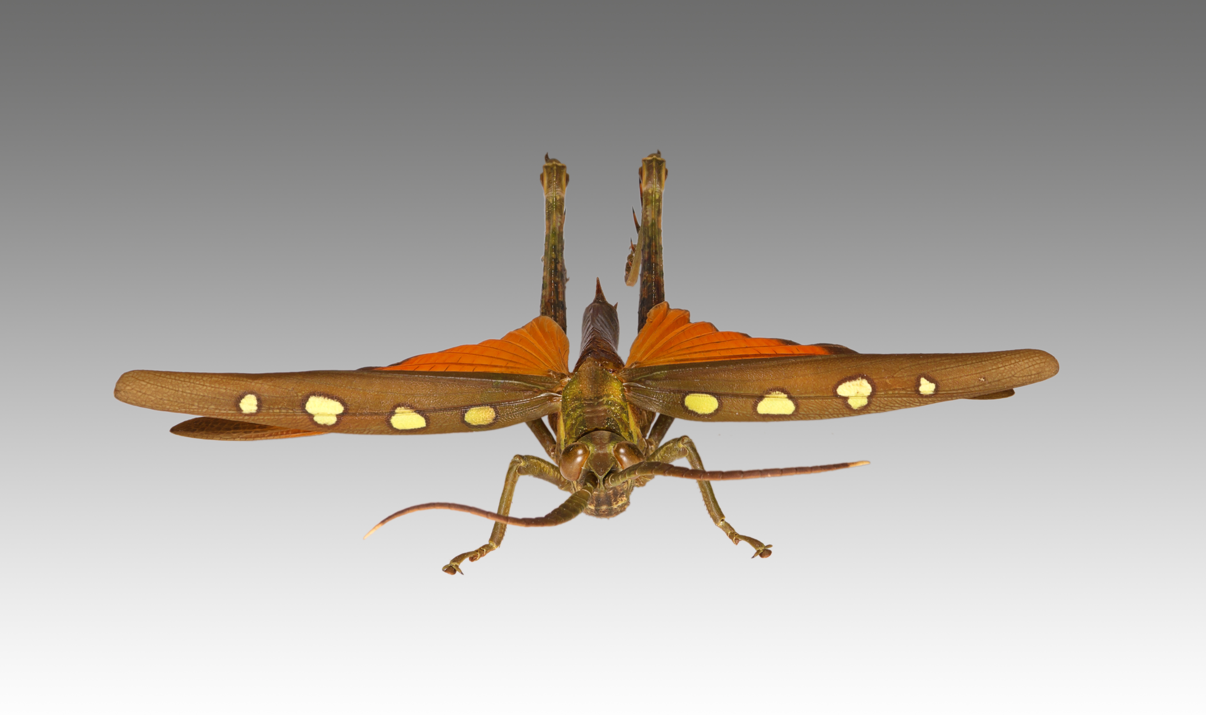 front view